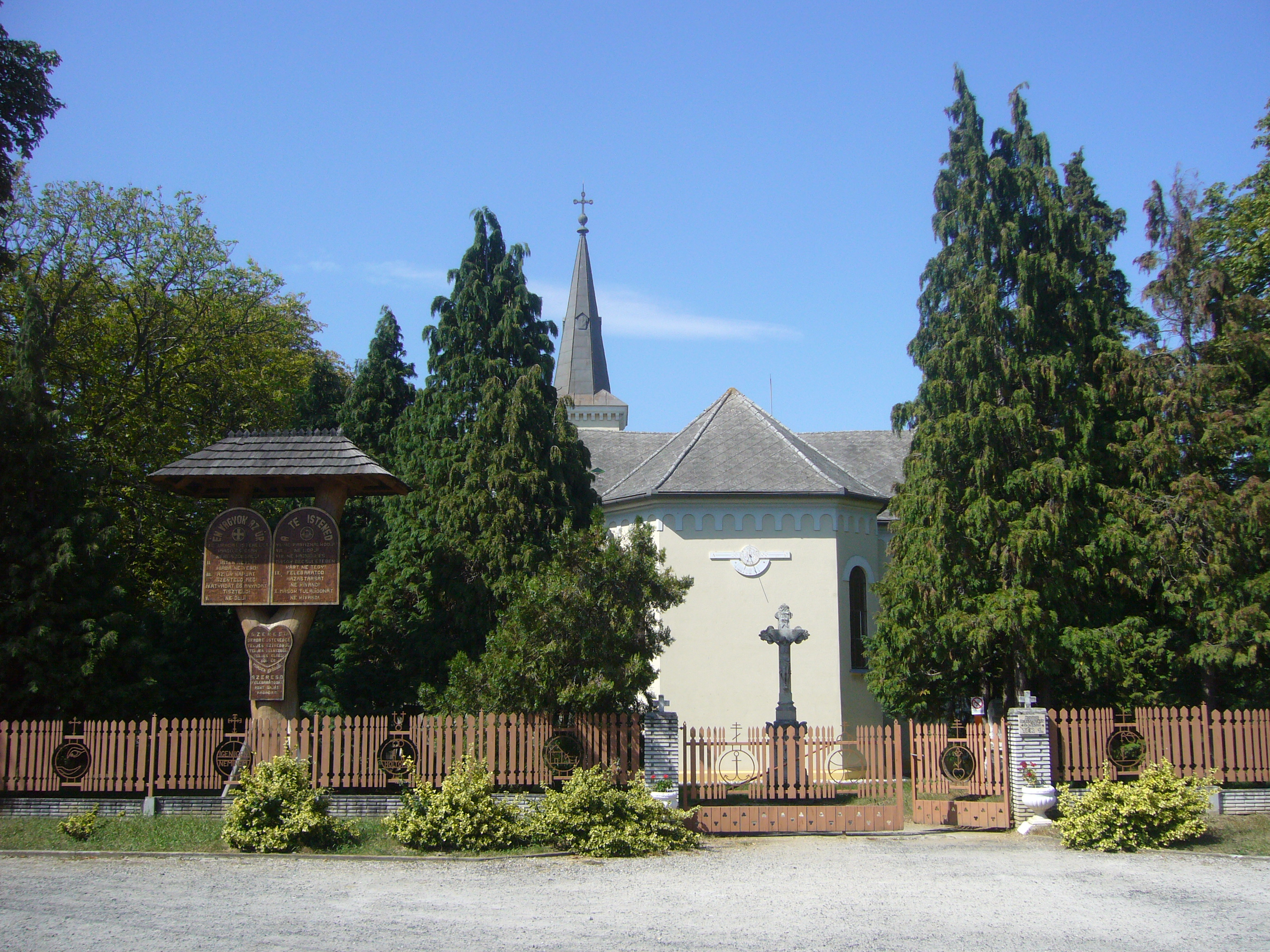 Nádasd